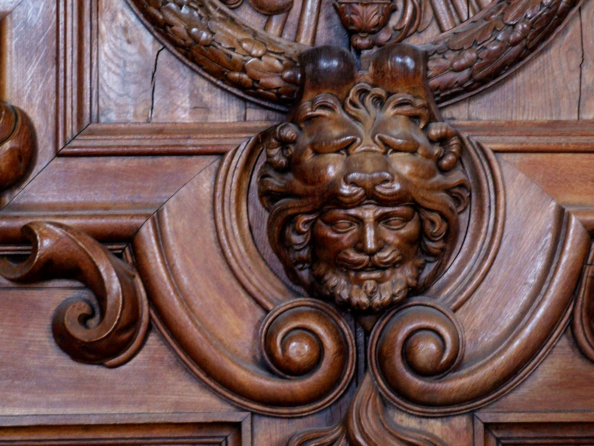 Francois I Gallery, Château de Fontainebleau, France